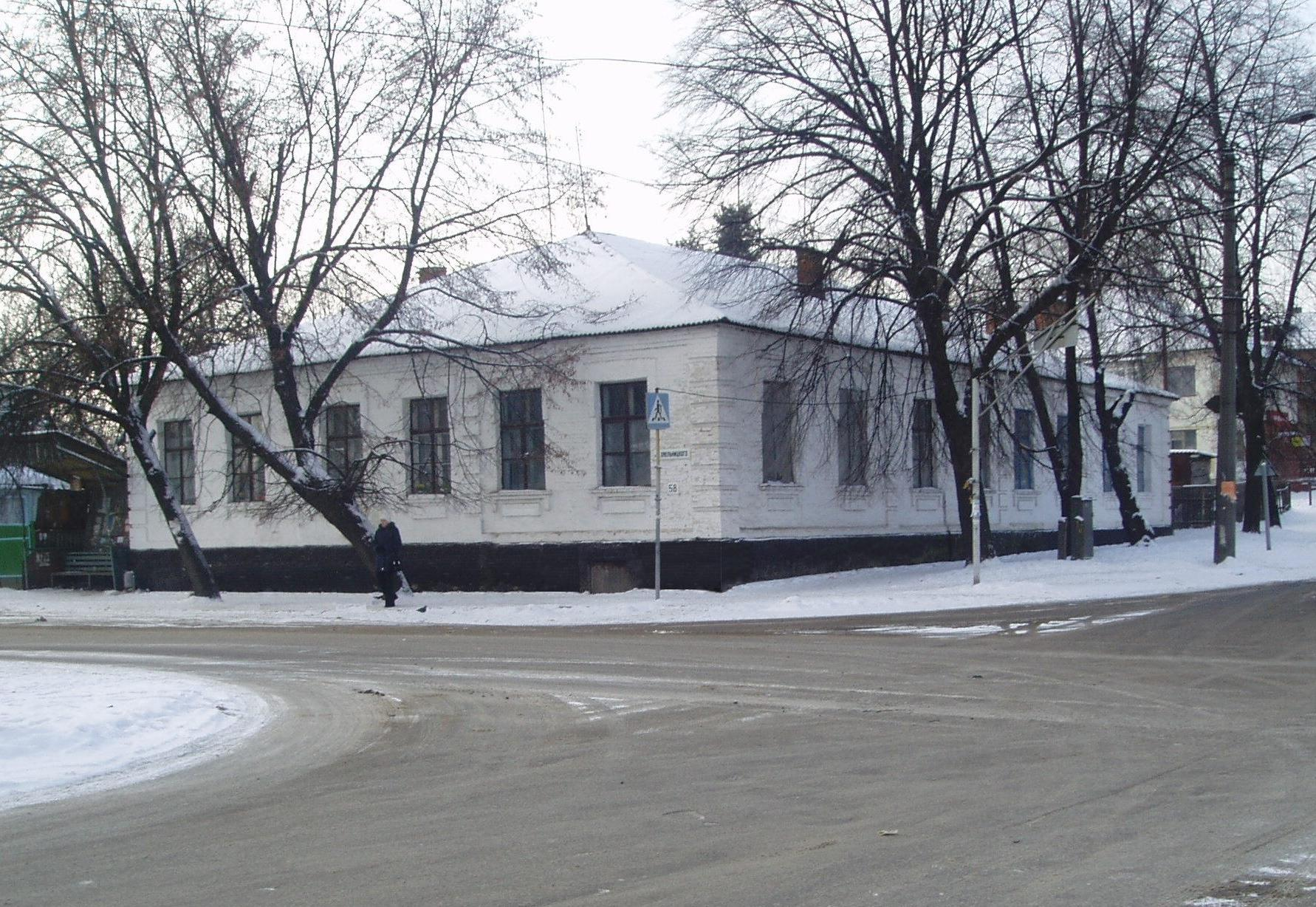 Приватне єврейське училище Таращі: приміщення Таращанської єшиви